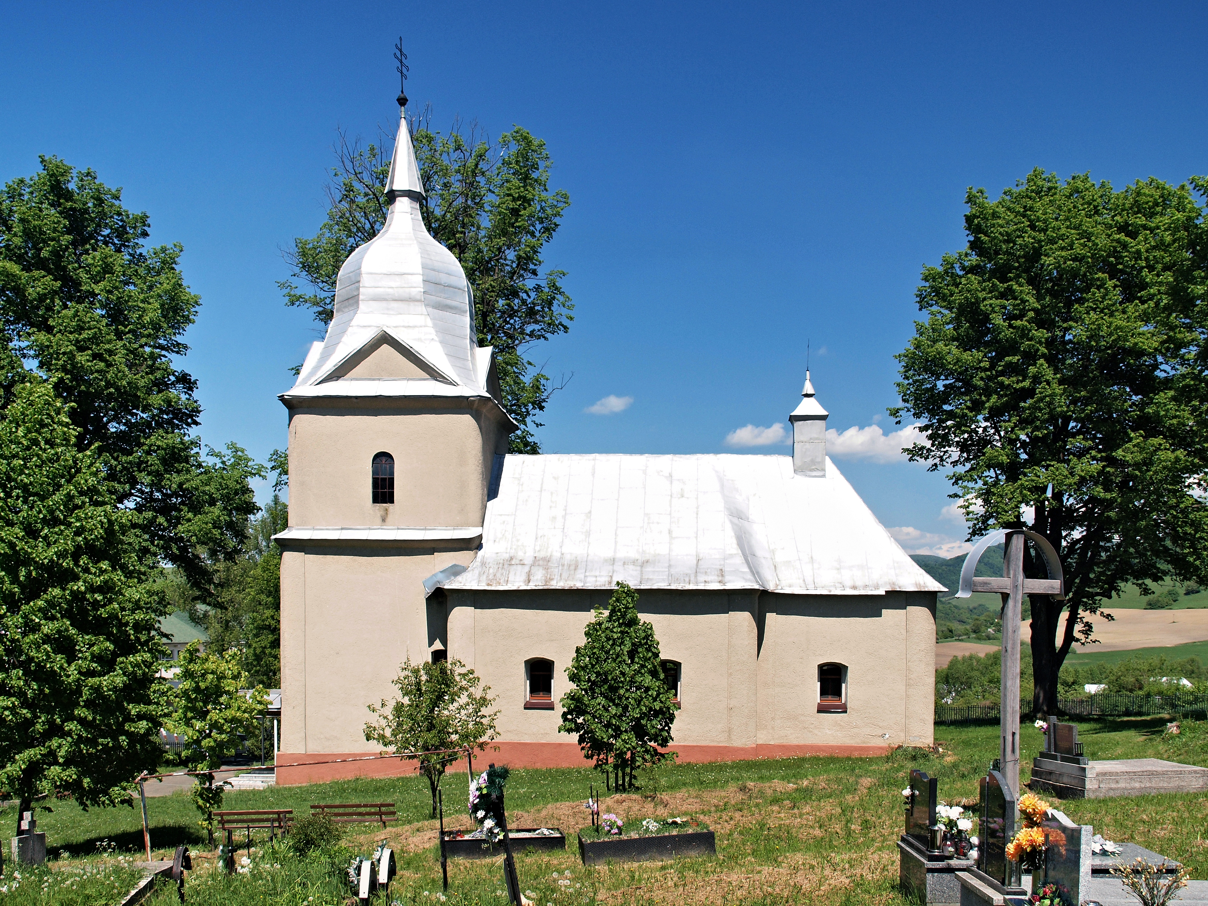 Hostovice, Prešov (Slovaquie) - Église greco-catholique dans le cimetière